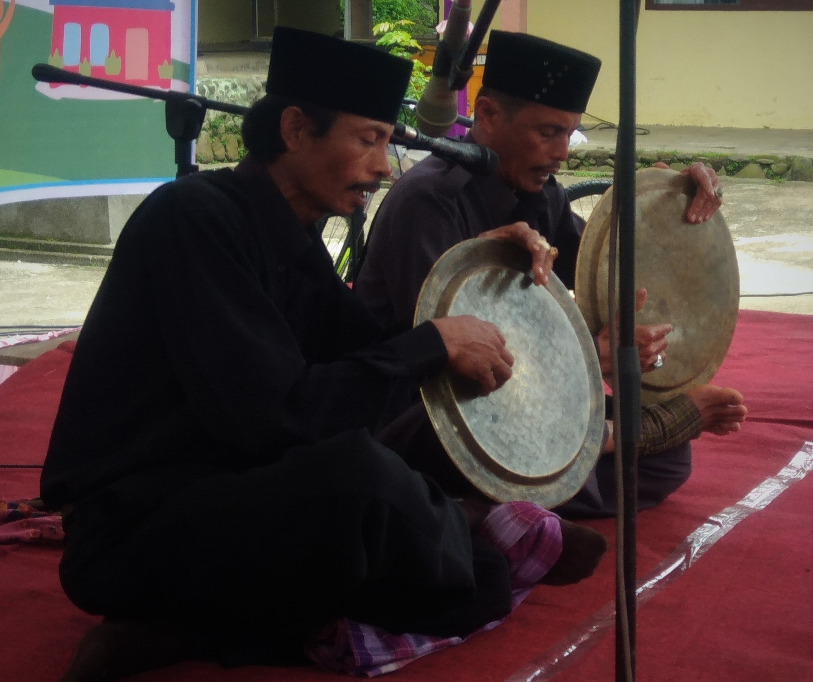 Salawat talam atau salawat dulang